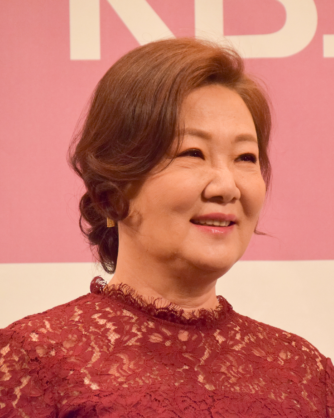 2019년 3월 19일 서울 강남구 임피리얼팰리스호텔 셀레나홀에서 열린 KBS 2TV 새 주말드라마 '세상에서 제일 예쁜 내 딸' 제작발표회장의김해숙